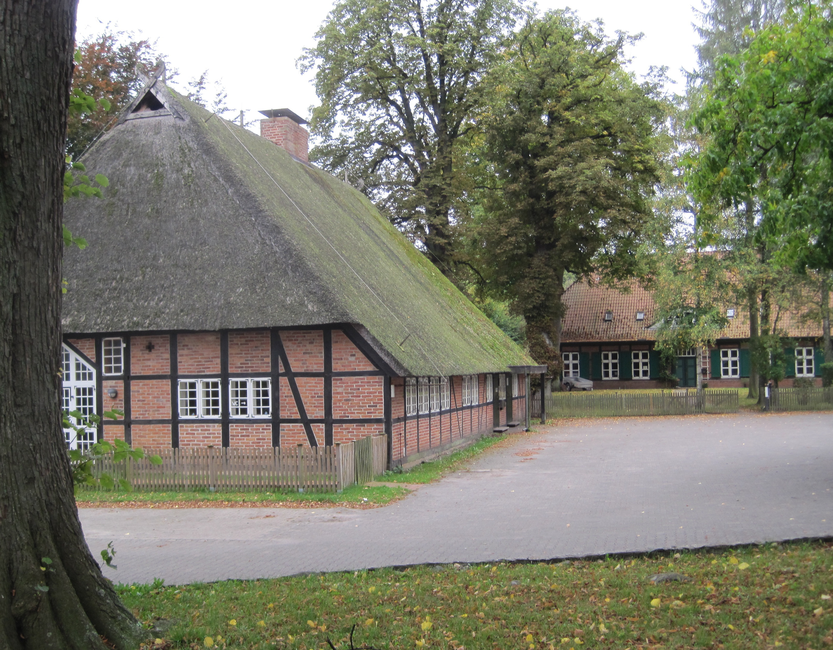 Nusse im Oktober 2012